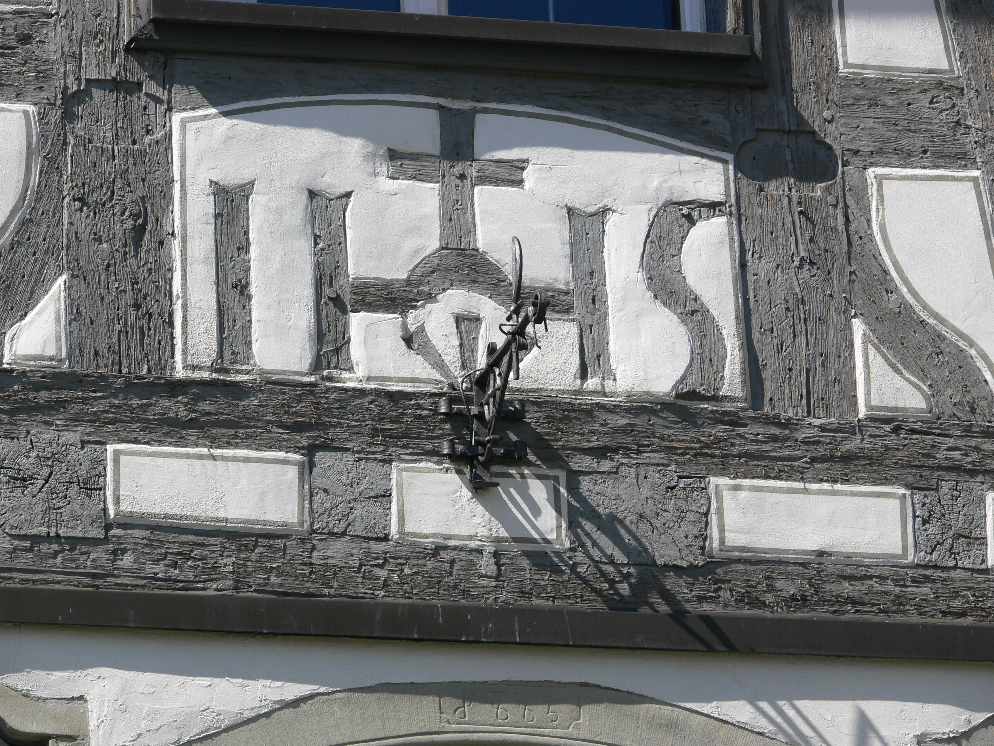 Ailingen, Stadt Friedrichshafen, Bodenseekreis: Ailingen, Altes Pfarrhaus, Fachwerkdetail über dem Eingang: Christusmonogramm IHS